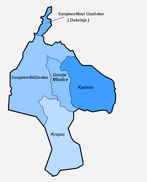 Положај Касиндола у општини Источна Илиџа